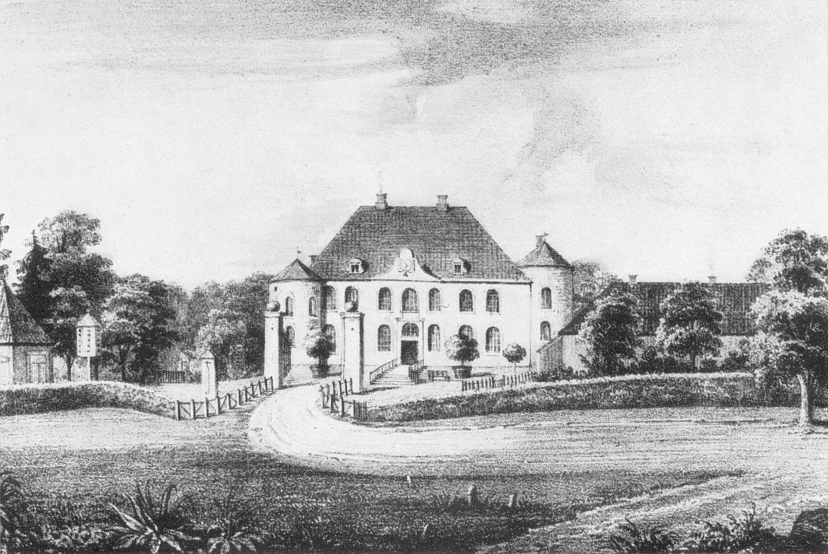 Lithografie des Schlosses Diepenbrock in Bocholt-Barlo